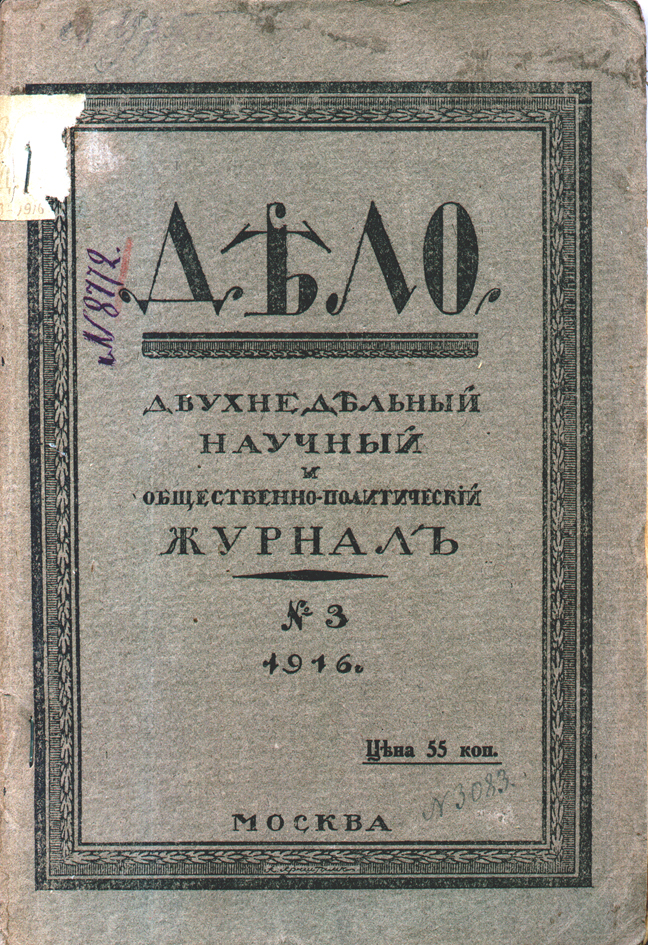 Обложка журнала "Дело"